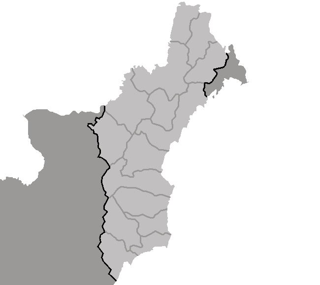 Map of Hamgyong-pukto, DPRK, 2006